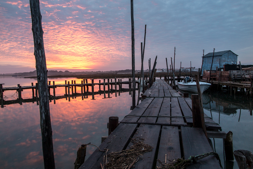 Sunrise @ Cais Palafítifo da Carrasqueira